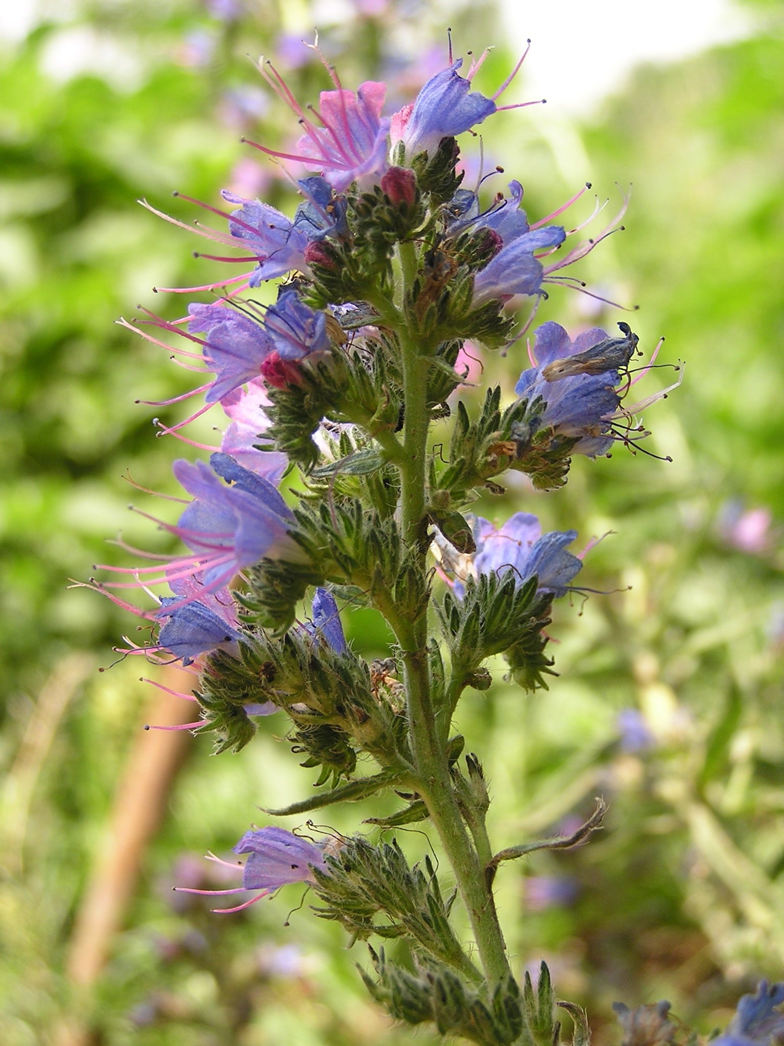 Растение